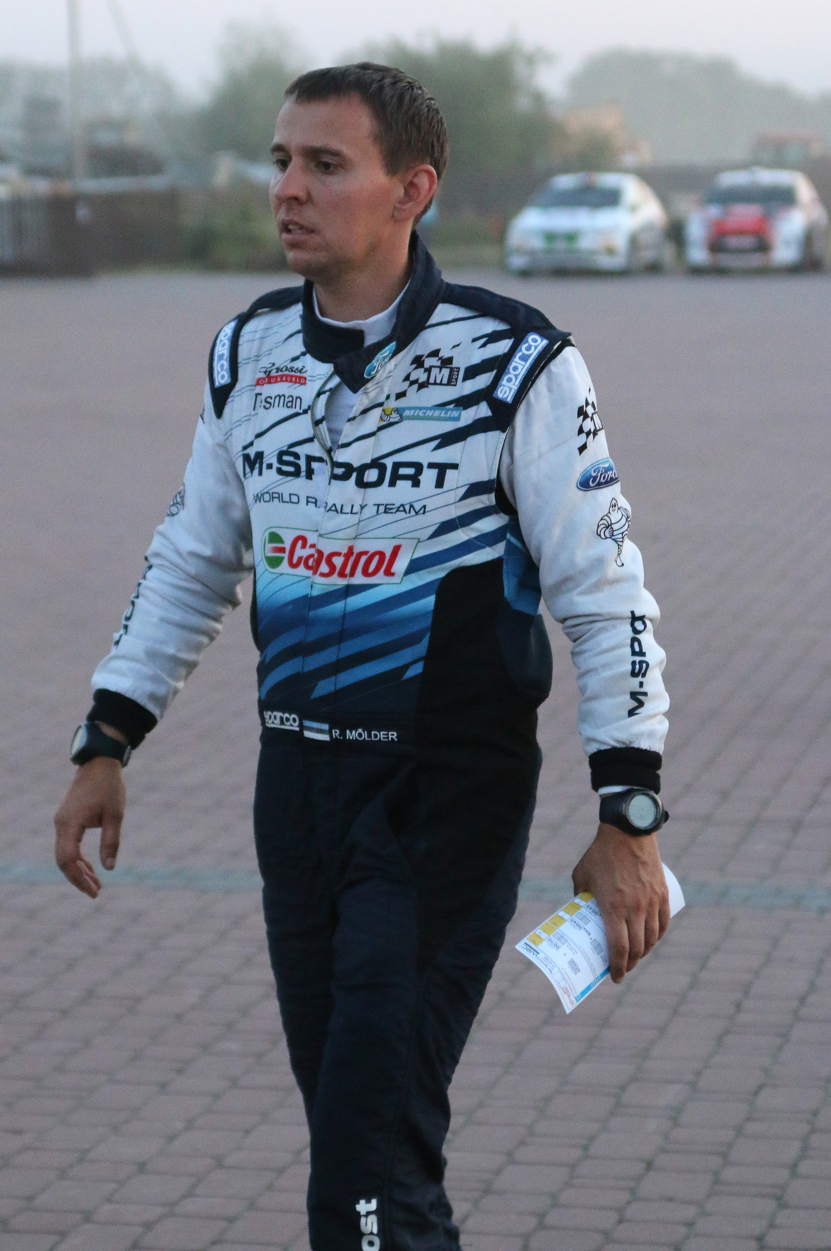 Hayden Paddon